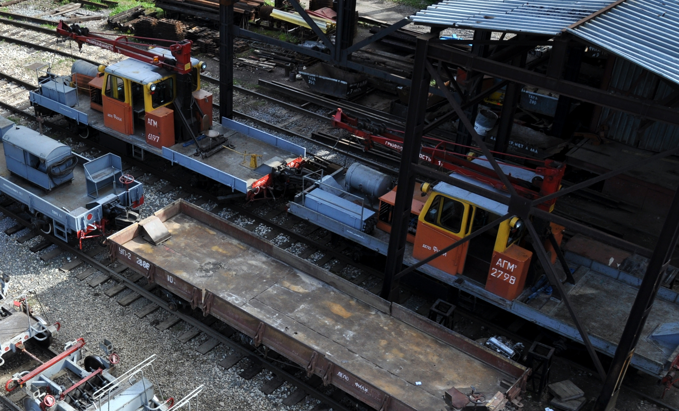 Автодрезины АГМу в электродепо Фили Московского метрополитена